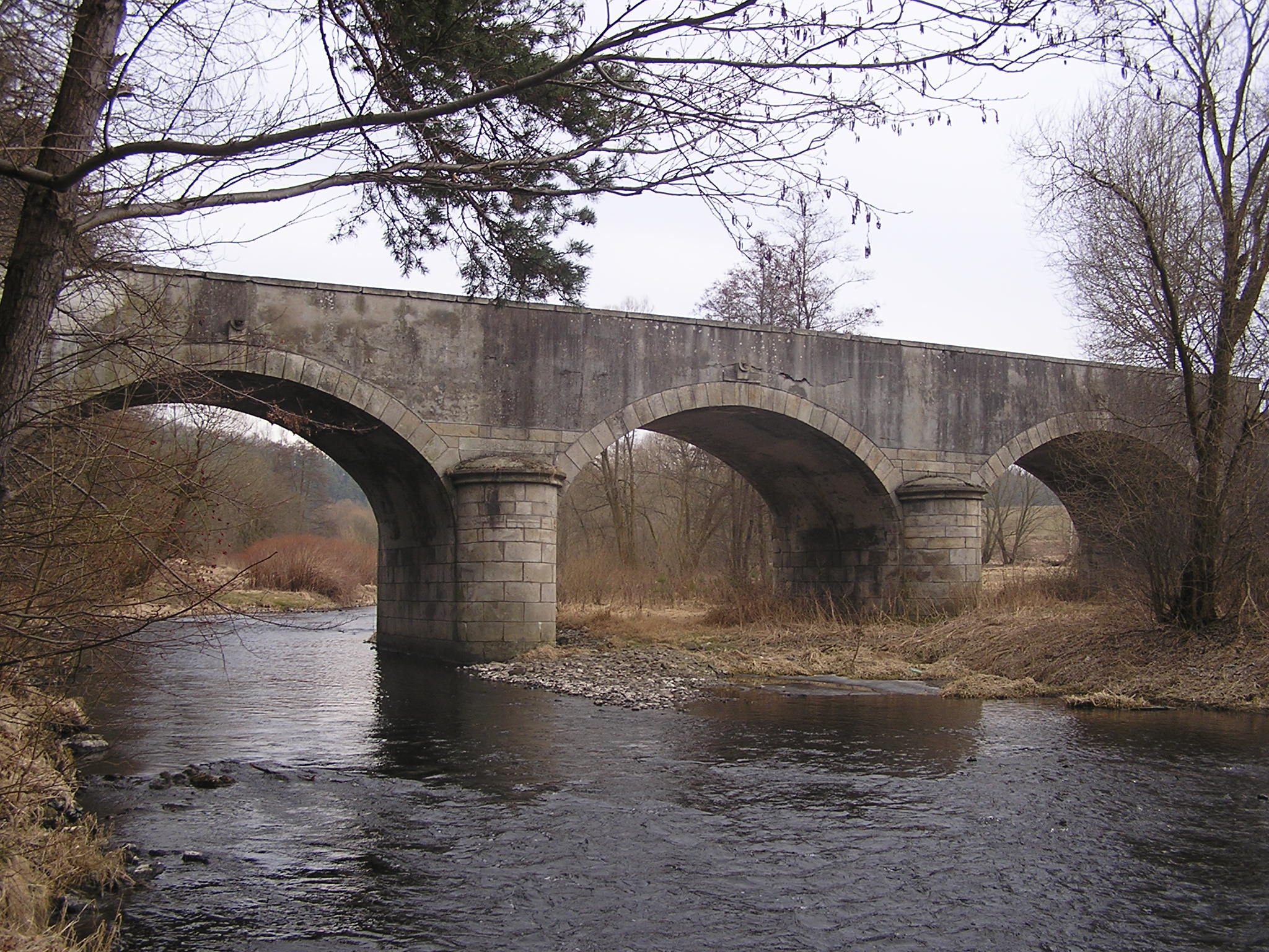 Most v Římově